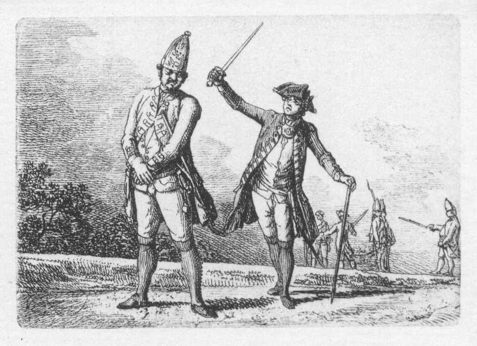 Militärstrafen. Wie ein ehrlicher Mann Prügel empfängt. (Beschreibung lt. Quelle) Blatt 1 Blatt 2